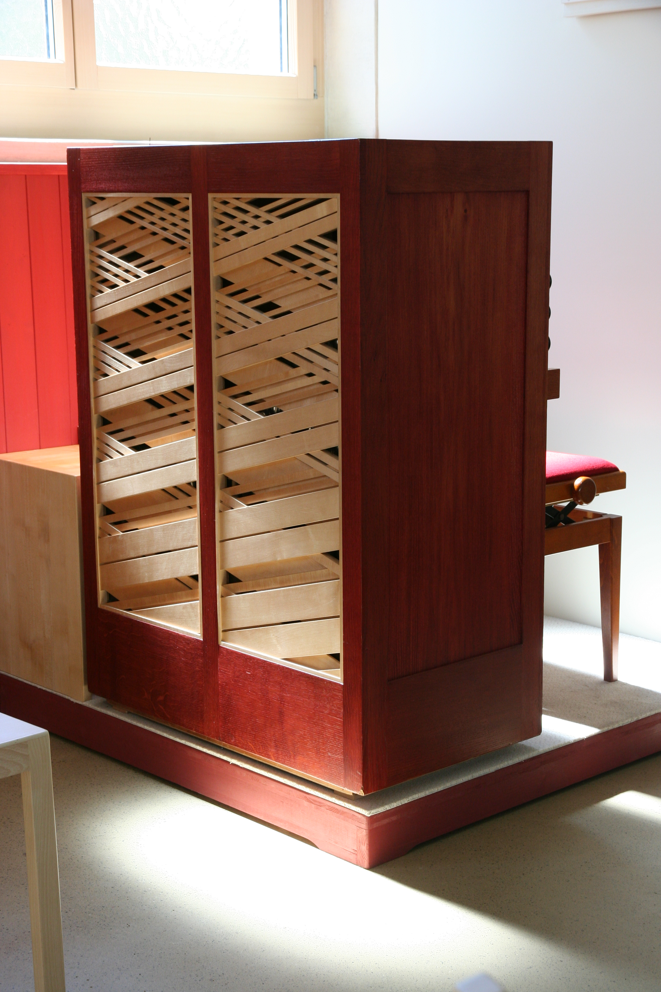 Römisch-katholische Kapelle Niederweningen